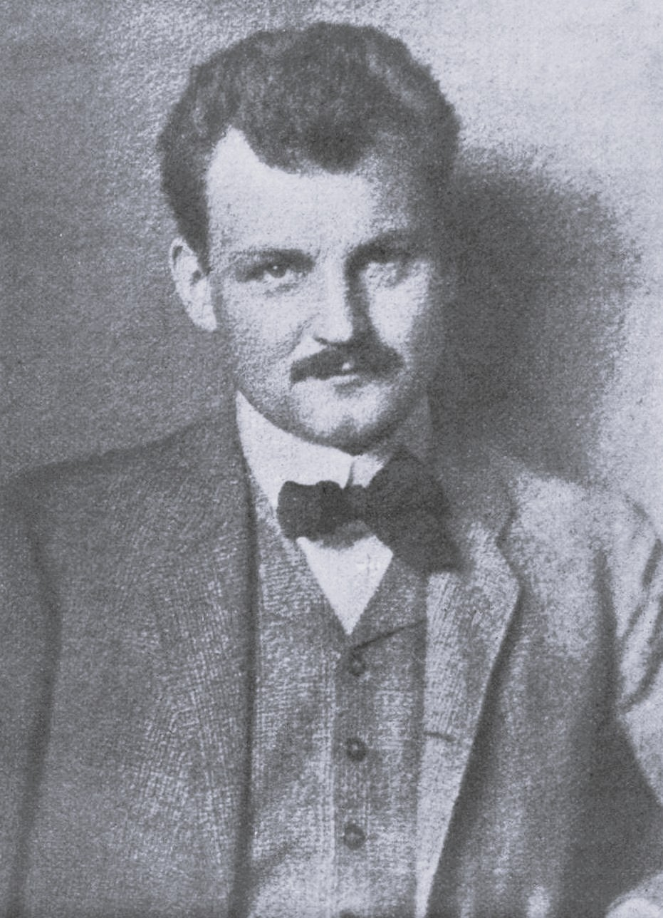 Porträtfoto von Friedrich Ostendorf